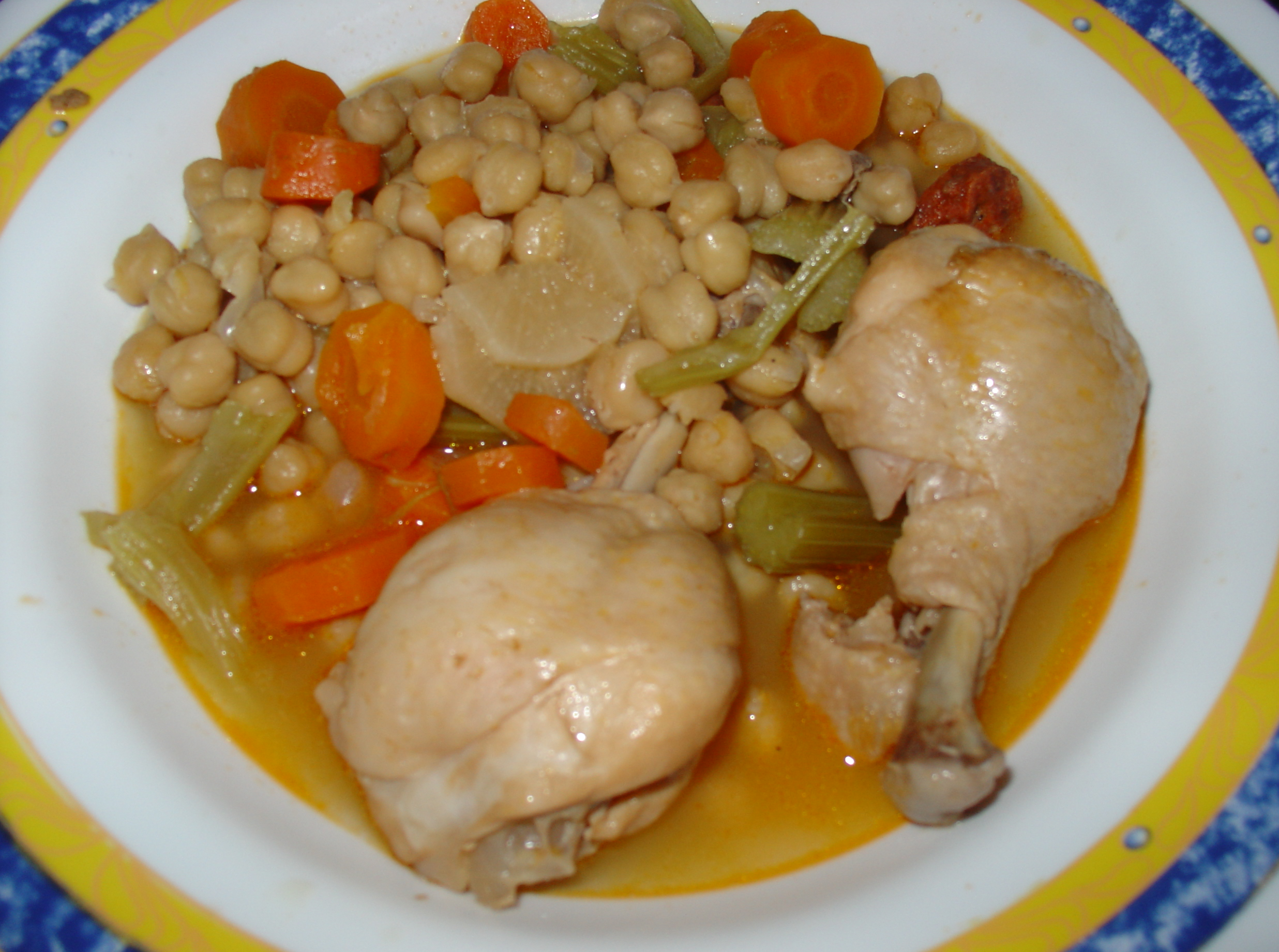 Cocido español. compuesto de: garbanzos o Cicer arietinum pollo o Gallus gallus apio o Apium graveolens zanahoria o Daucus carota nabo o col Brassica sp. puerro o Allium ampeloprasum var. porrum chorizo